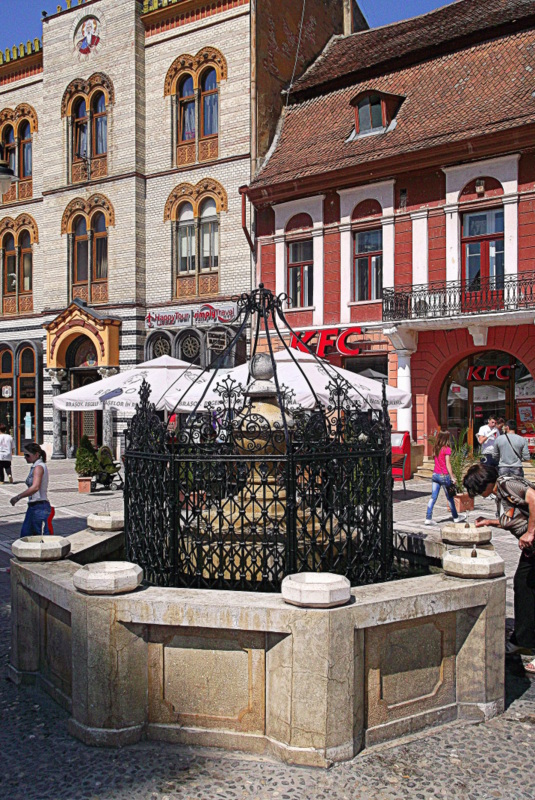 Braszów, rynek, fontanna